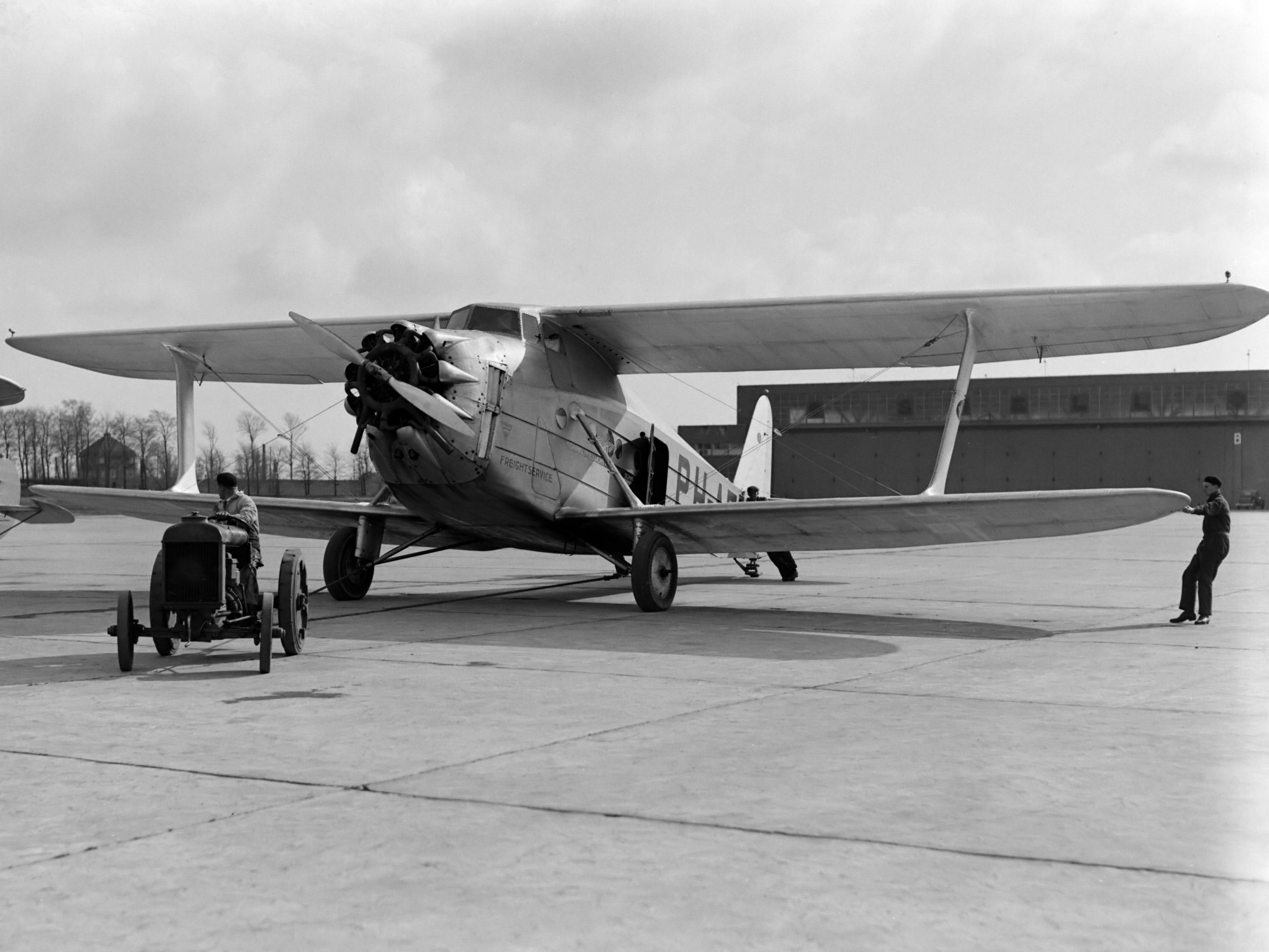 Reportage Schiphol. Een vliegtuig wordt weggesleept bij Schiphol 1933